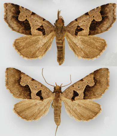 Baniana gobar male (top), female (bottom)